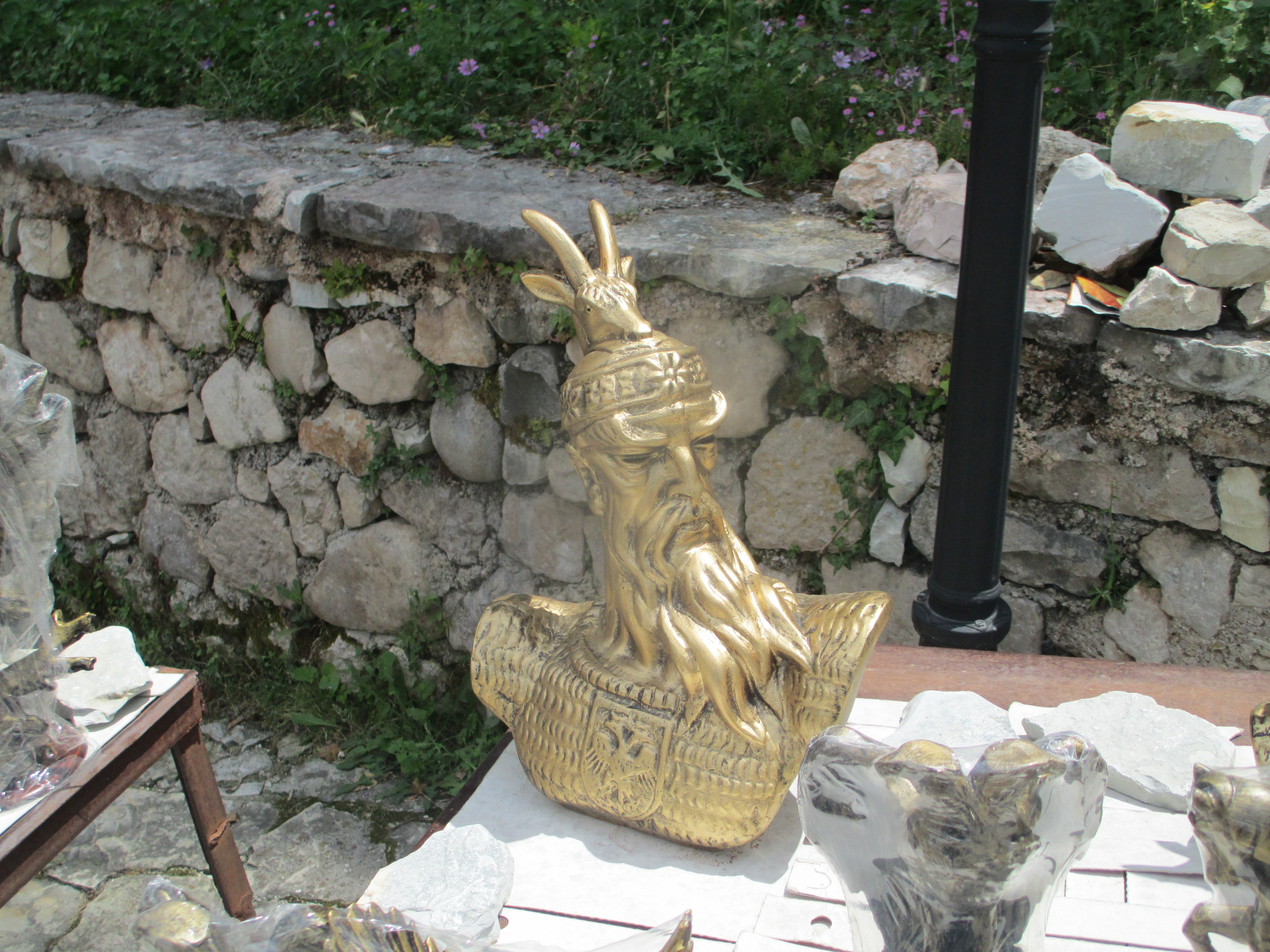 בזאר בקרויה, פסל סקנדרבג